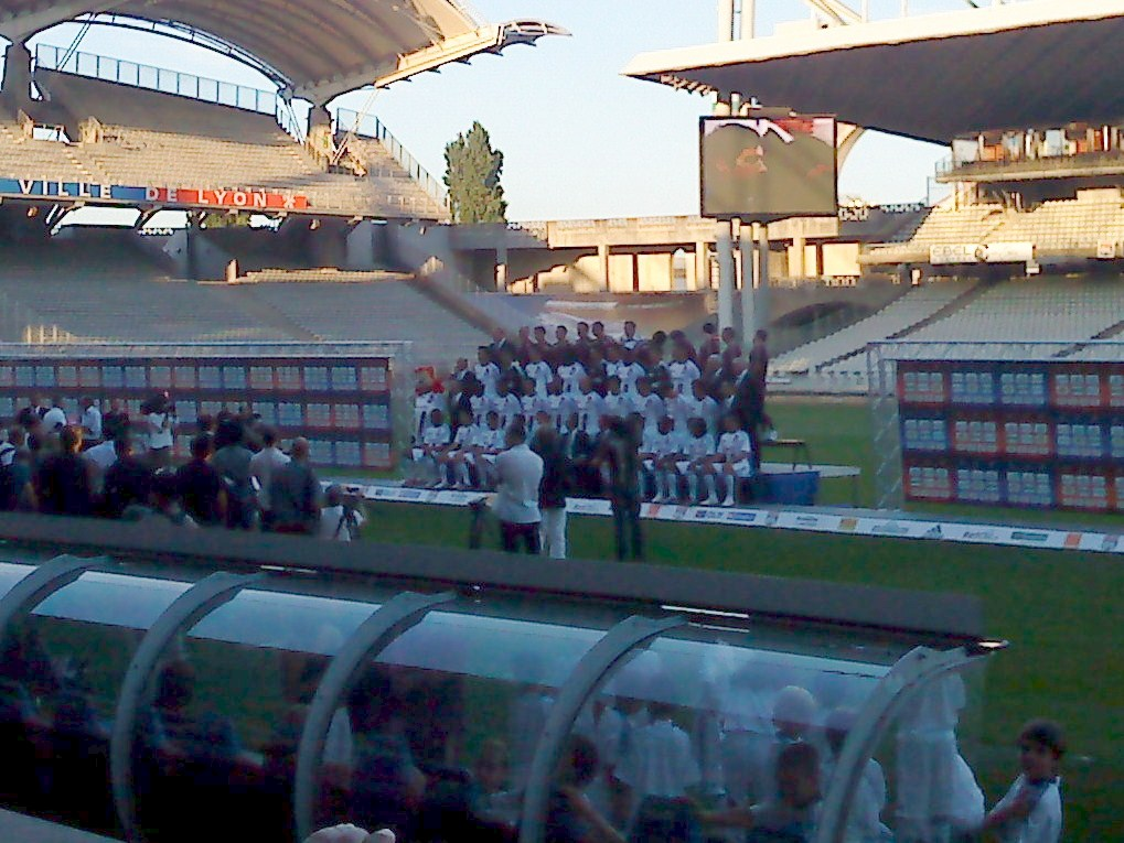 Lors de la présentation de l'effectif de l'OL pour la saison 2010-2011 -- photo de groupe.